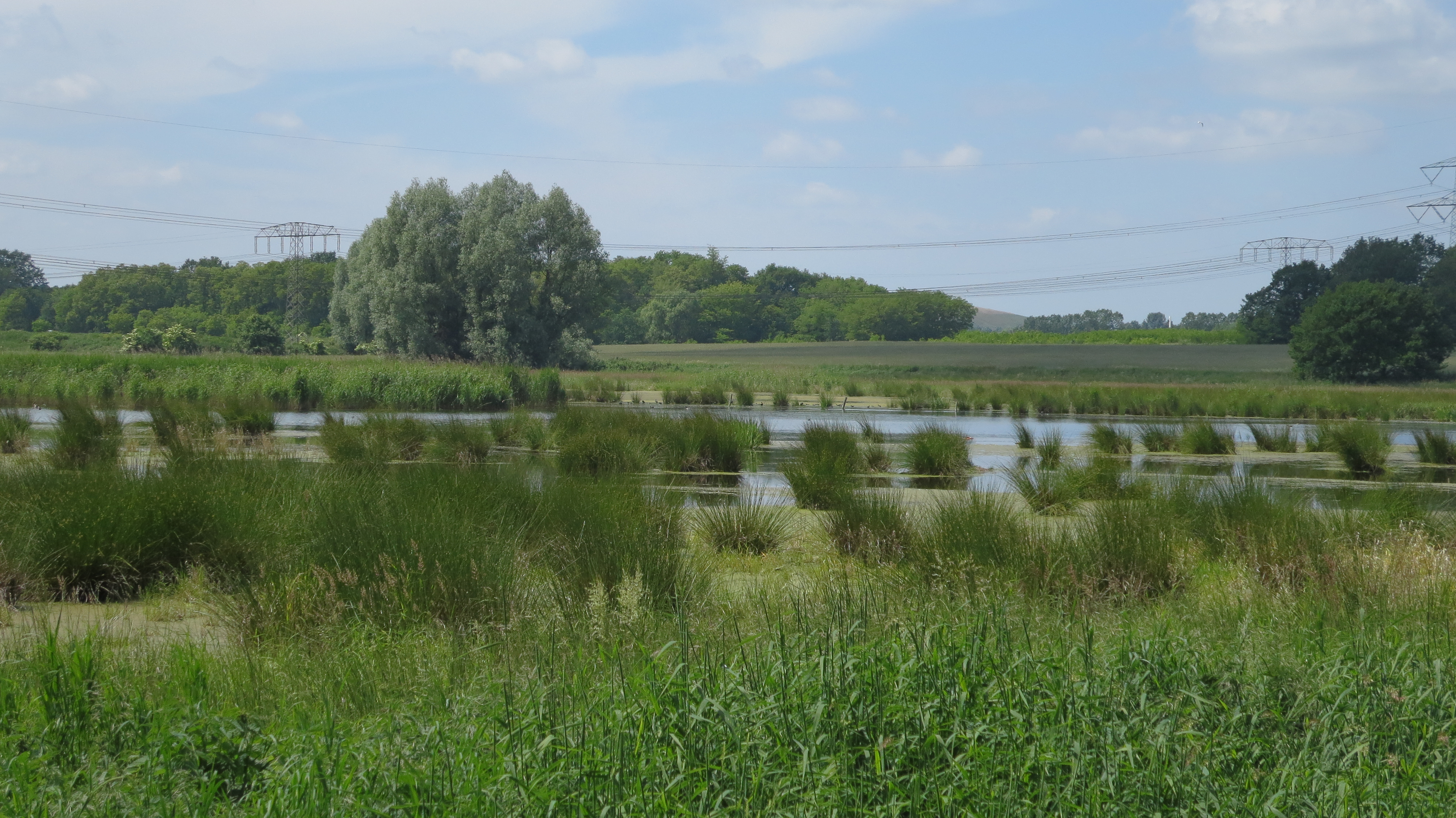 Teichlandschaft am Alten Lietzengraben im NSG Bogenseekette und Lietzengrabenniederung